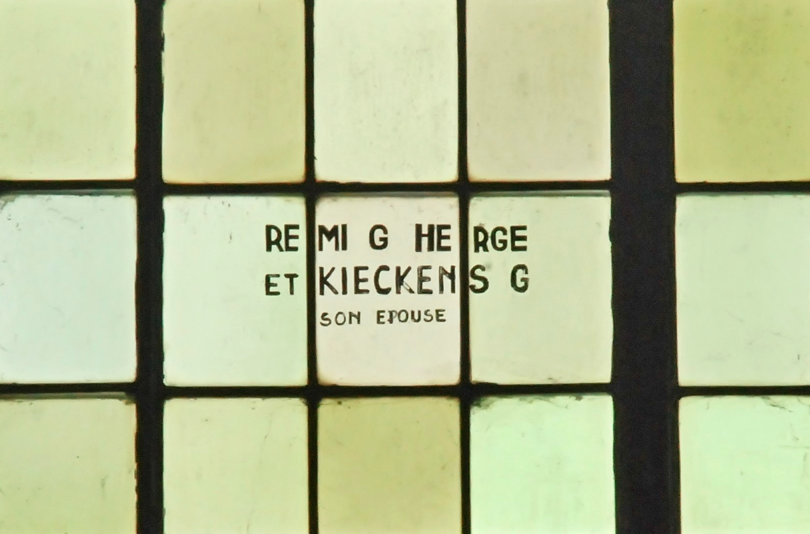 Belgique - Brabant wallon - Ottignies-Louvain-la-Neuve - Céroux - église Notre-Dame de Bon Secours (néo-gothique, Antoine Moreau, 1848)